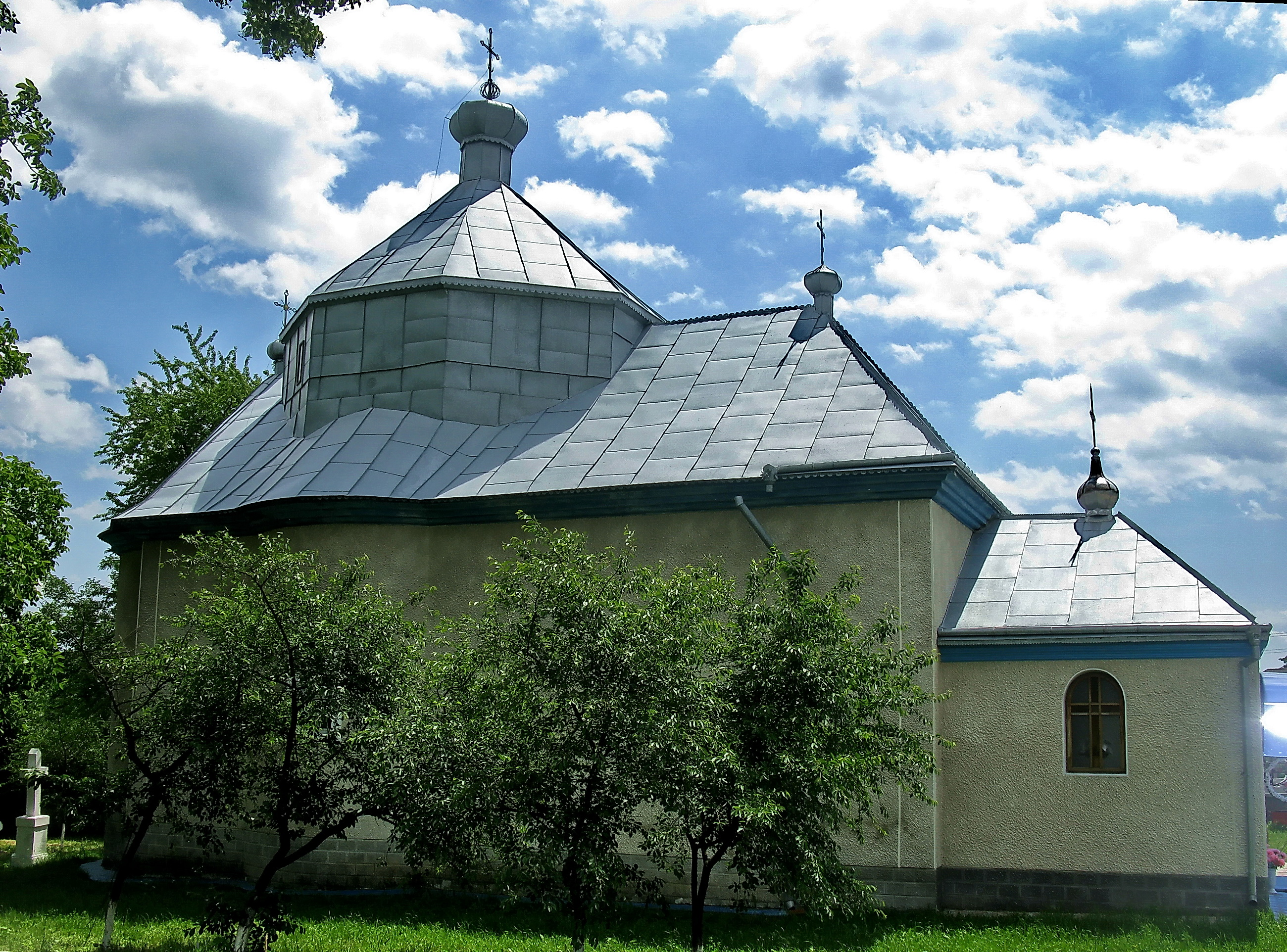 Покровська церква (мур.), Репужинці